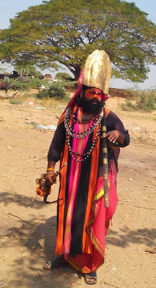 కాటిపాపడి వేషధారణ